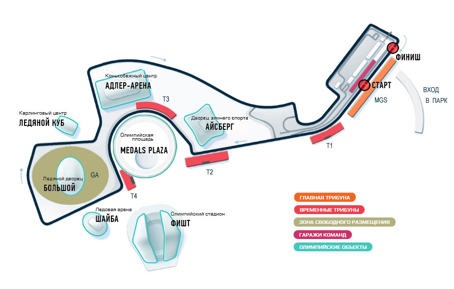 Схематическое изображение "Сочи Автодром"